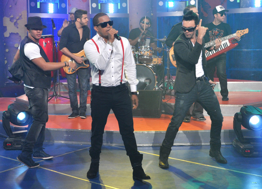 Ilegales, agrupación musical dominicana.